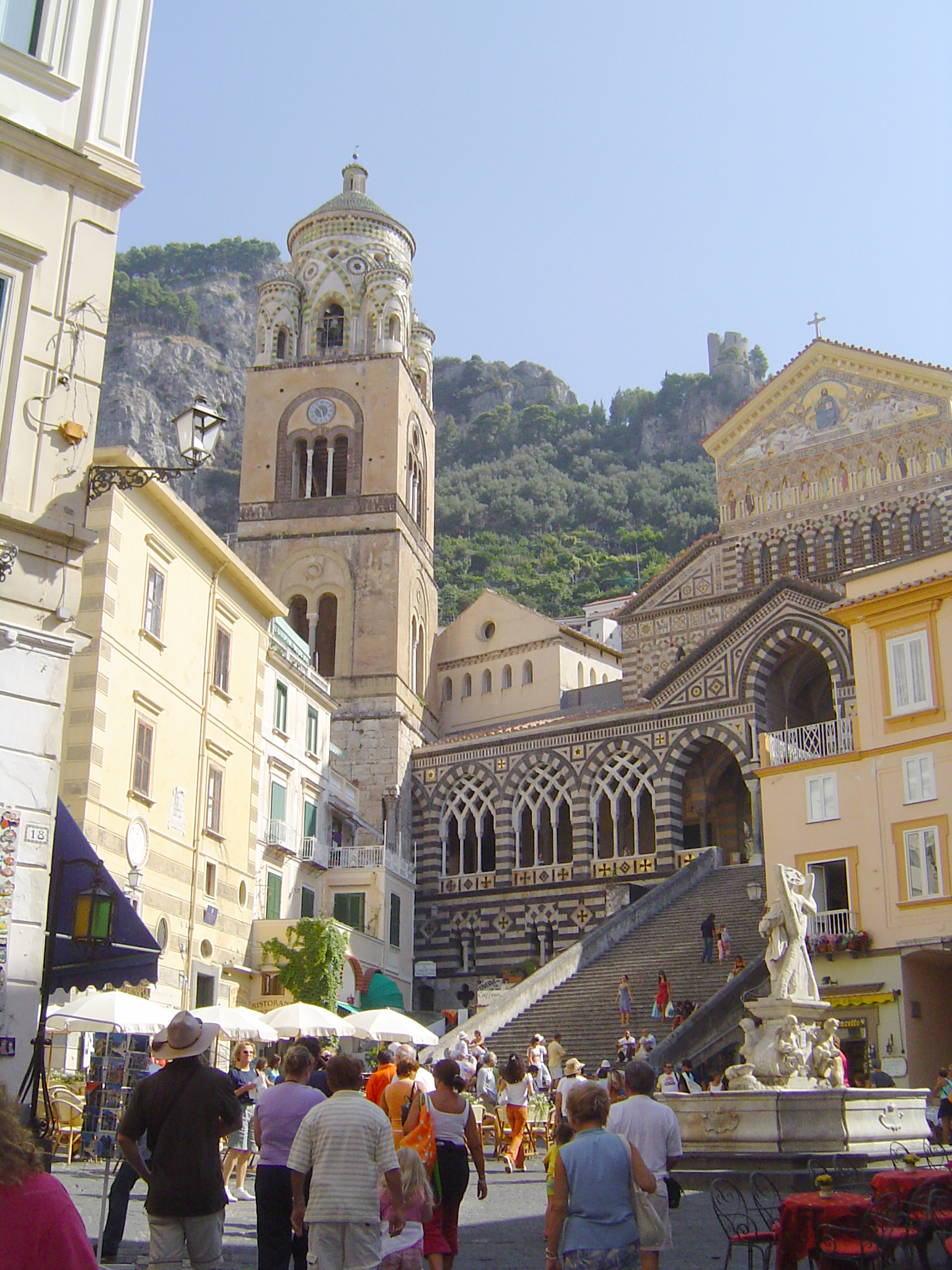 Den Doum vun Amalfi.